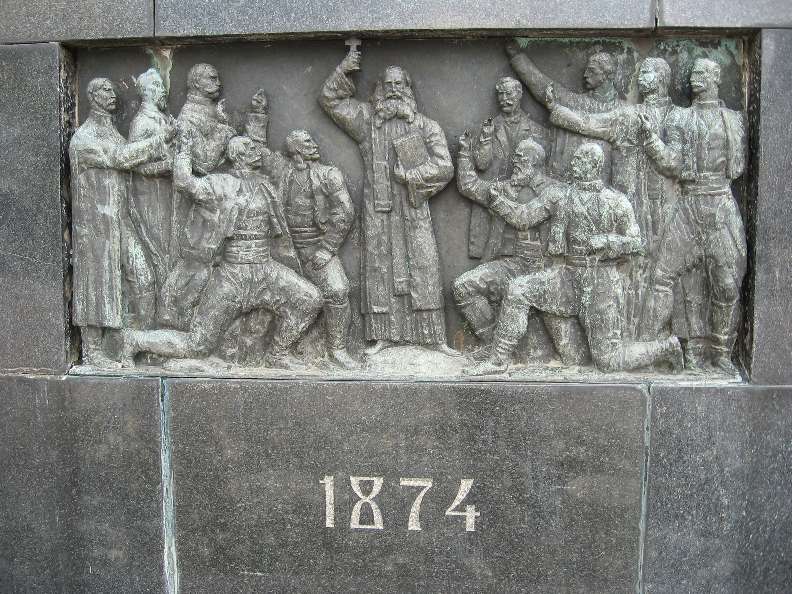 Споменик ослободиоцима Ниша. Снимљено априла 2010.